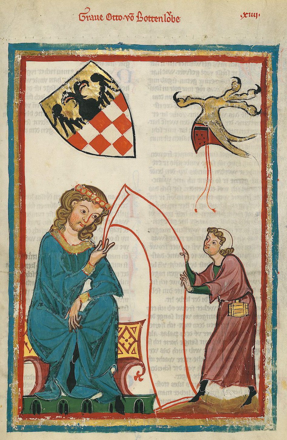 Codex Manesse, UB Heidelberg, Cod. Pal. germ. 848, fol. 27r, Graf Otto von Botenlauben